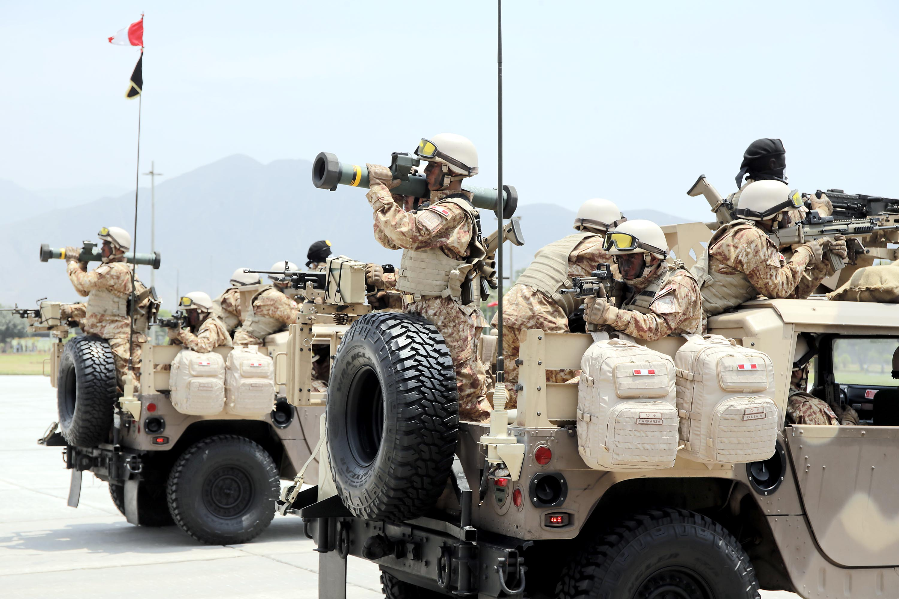 El ministro de Defensa, Pedro Cateriano Bellido, participó en la ceremonia por el Día del Ejército y el 189 aniversario de la Batalla de Ayacucho, decisiva para la Independencia del Perú y que puso fin al dominio español en América del Sur. “Hoy evocamos a quienes hicieron del Perú una república soberana. Hace 189 años la Pampa de la Quinua fue escenario donde el Ejército Libertador integrado por soldados de varias naciones pelearon por todo un continente”, señaló el titular del sector, al acompañar al Presidente Ollanta Humala en el evento realizado en el Cuartel General del Ejército en San Borja.